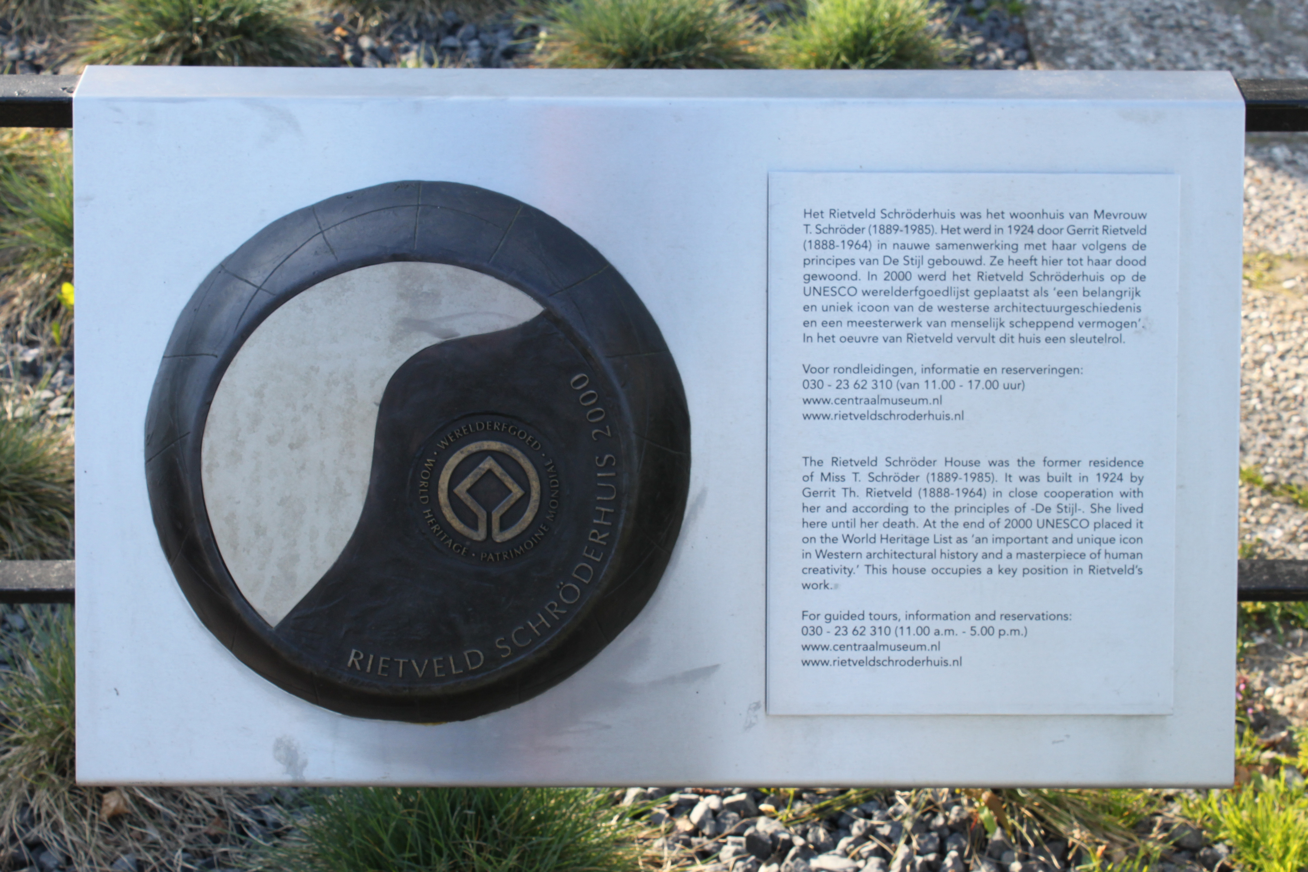 Het Rietveld-Schröderhuis in Utrecht